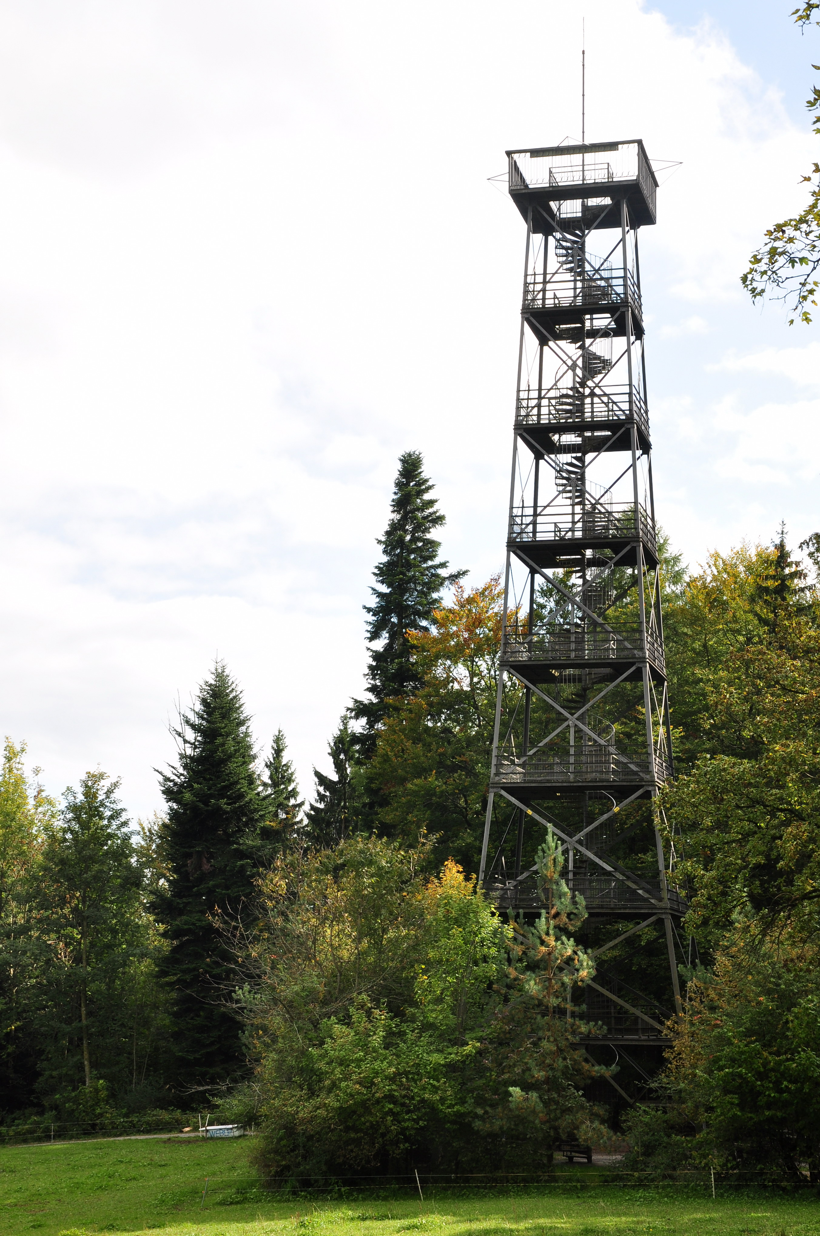 Aussichtsturm on Pfannenstiel (Switzerland)